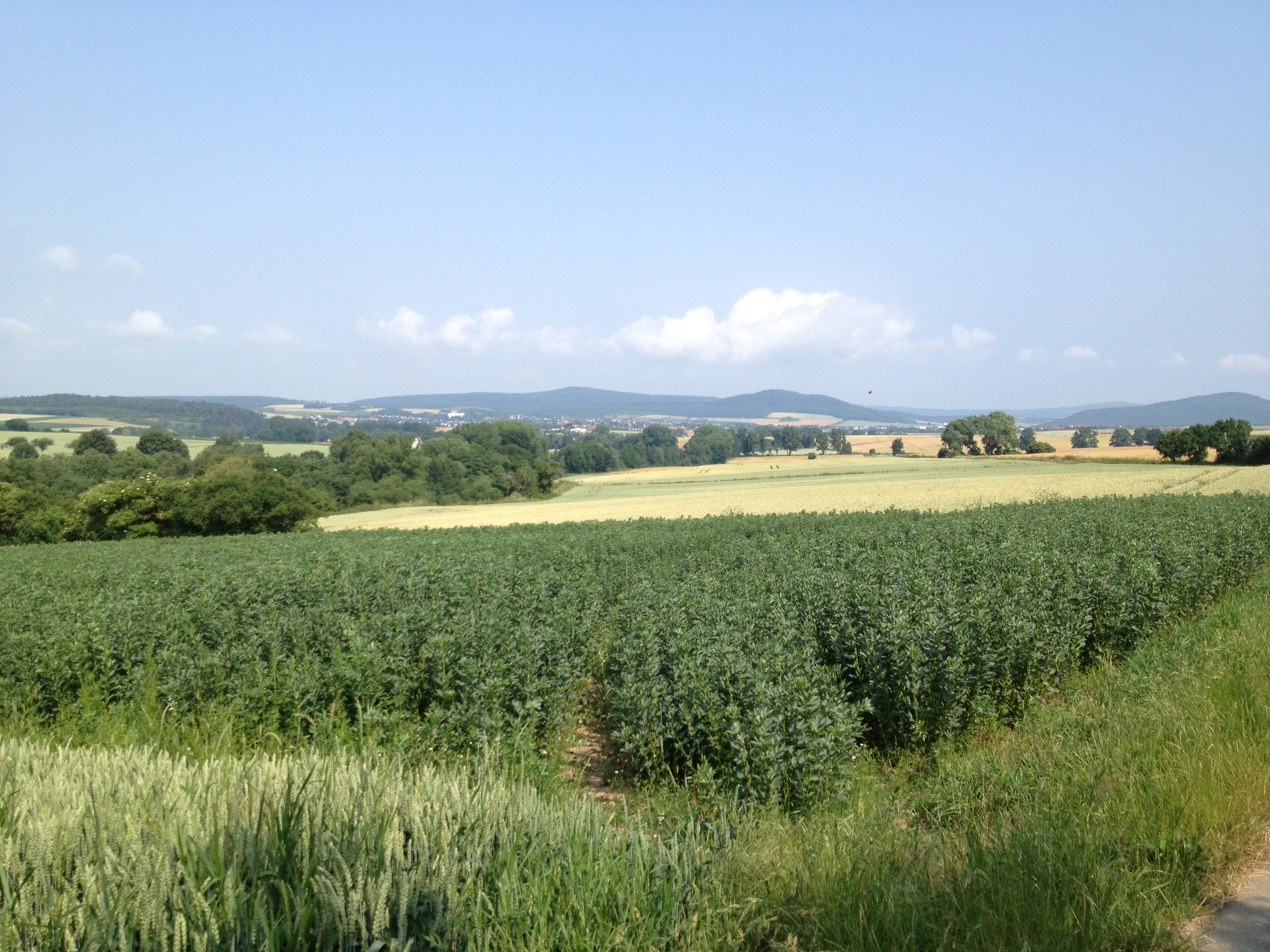 Blick vom Märchenland-Radrundweg Höhe Bahnstrecke Kassel-Warburg auf Hofgeismar (schon im Gemeindegebiet Grebenstein)